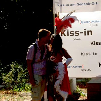 Das Bild entstand auf dem CSD 2006 und ist absichtlich ein wenig dunkler, damit die abgebildeten Personen nicht erkannt werden, die Bildaussage bleibt ja trotzdem voll erhalten. Bei einer Verwendung des Bildes auf anderen Seiten ausser Wikipedia würde ich mich über eine Benachrichtigung auf meiner Diskussionseite freuen.